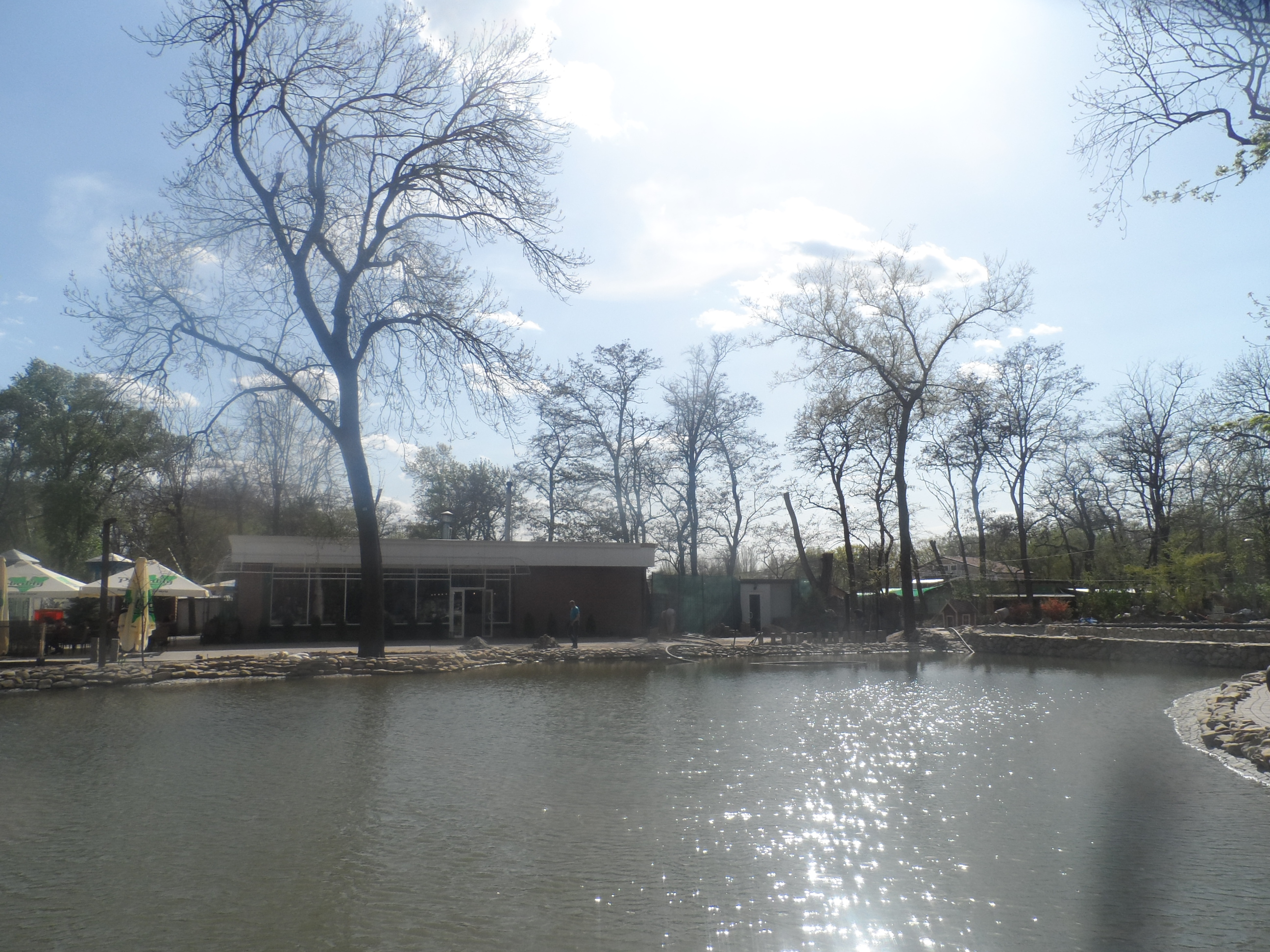 2018 год